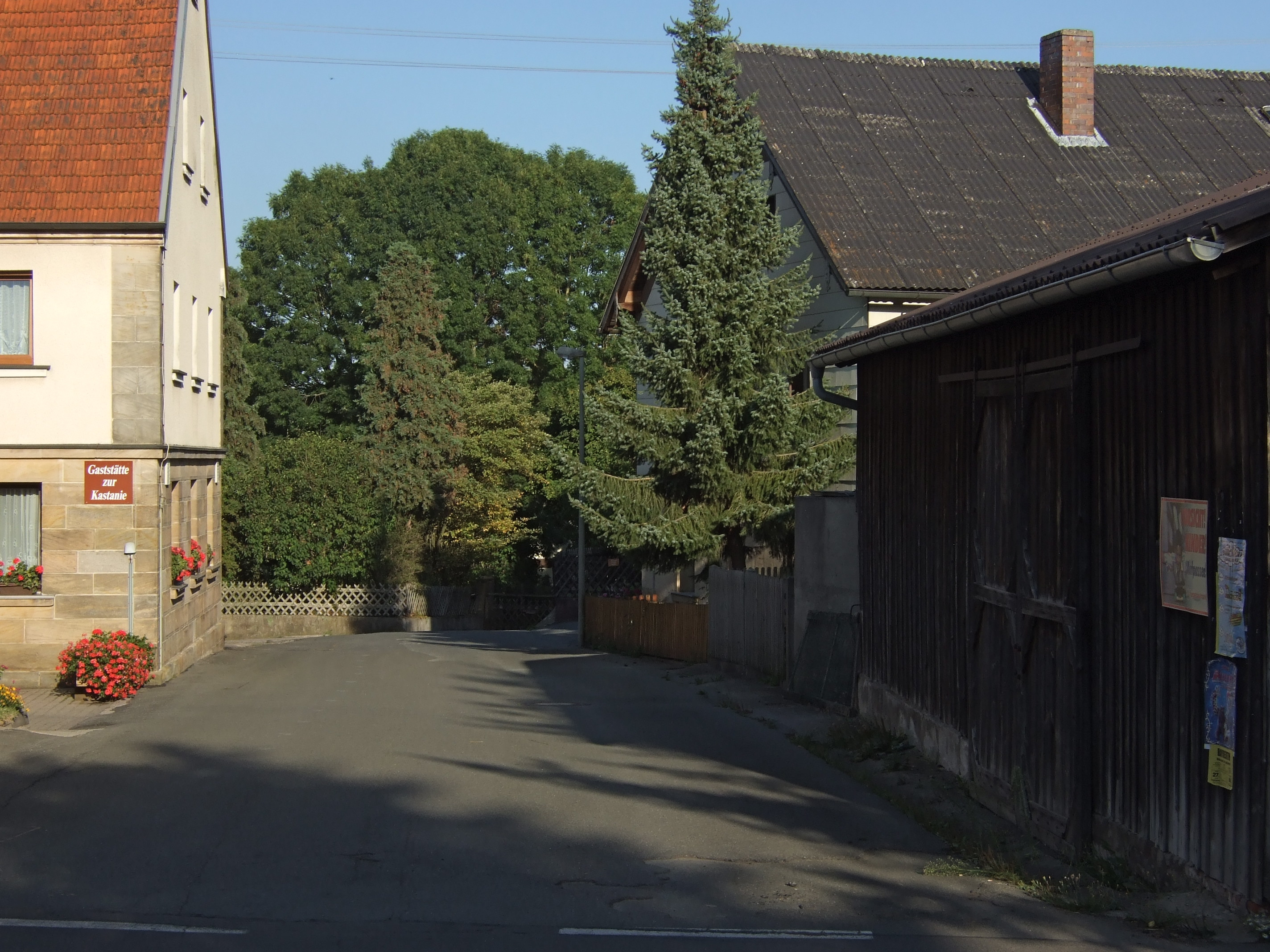 Hofwiesengasse Bayreuth